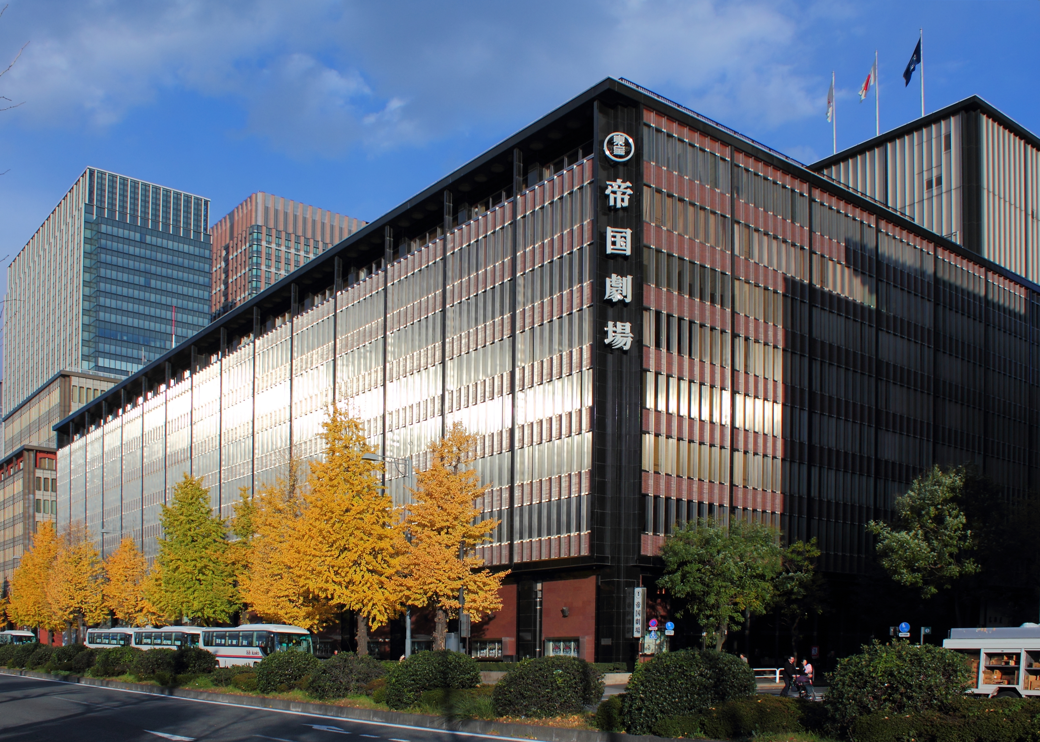 帝国劇場（東京都千代田区）